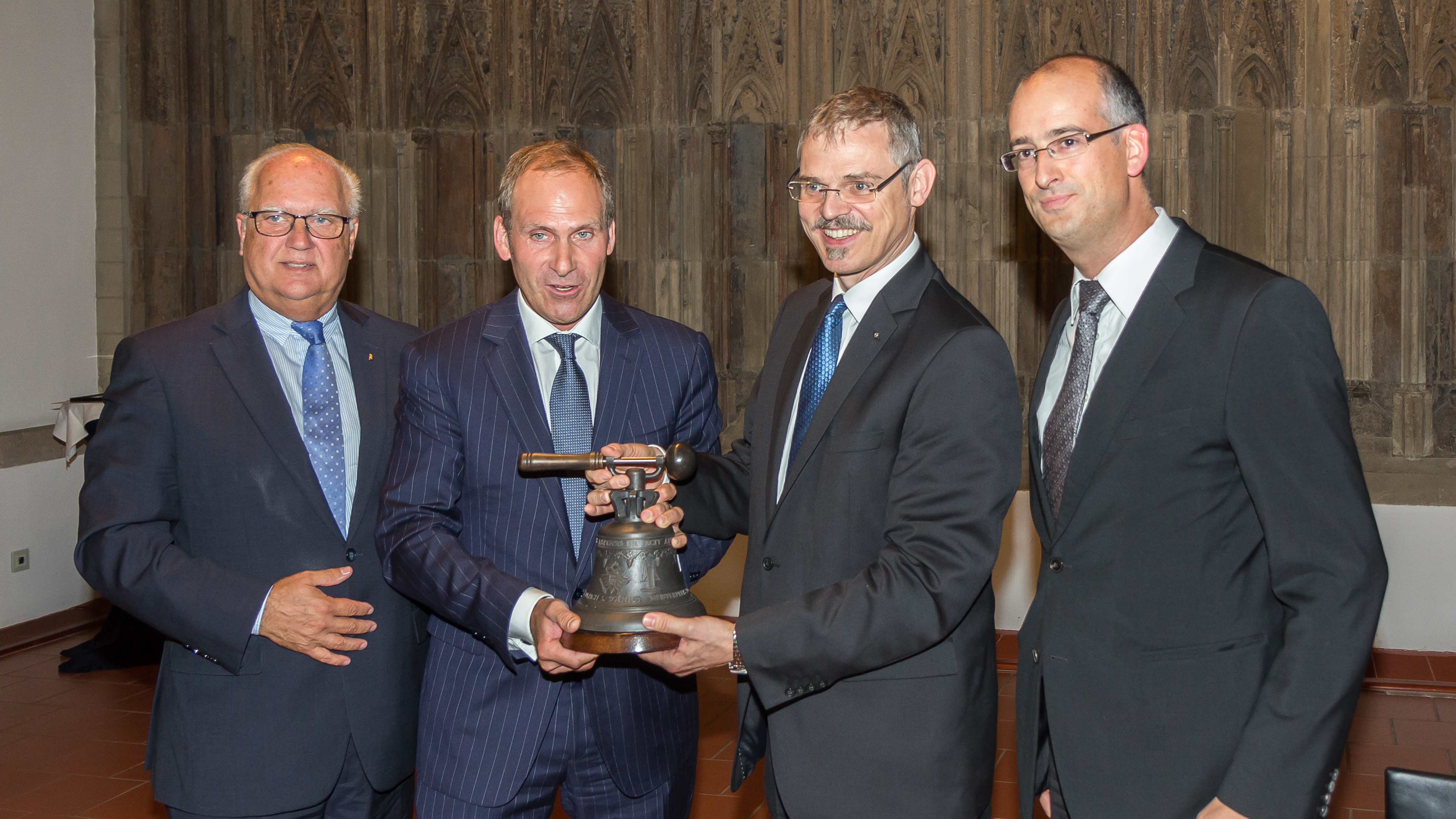 Verleihung des Meisterpreises an Ulrich S. Soénius im Hansasaal des Historischen Rathauses der Stadt Köln.Die Kreishandwerkerschaft Köln ist Träger der Stiftung des Kölnhandwerks zur Förderung des demokratischen Staatswesens. Die Stiftung verleiht alle zwei Jahre den sog. Meisterpreis an herausragende Persönlichkeiten, die sich für das Unternehmertum einsetzen und sich überdurchschnittlich gesellschaftlich und sozial engagieren.